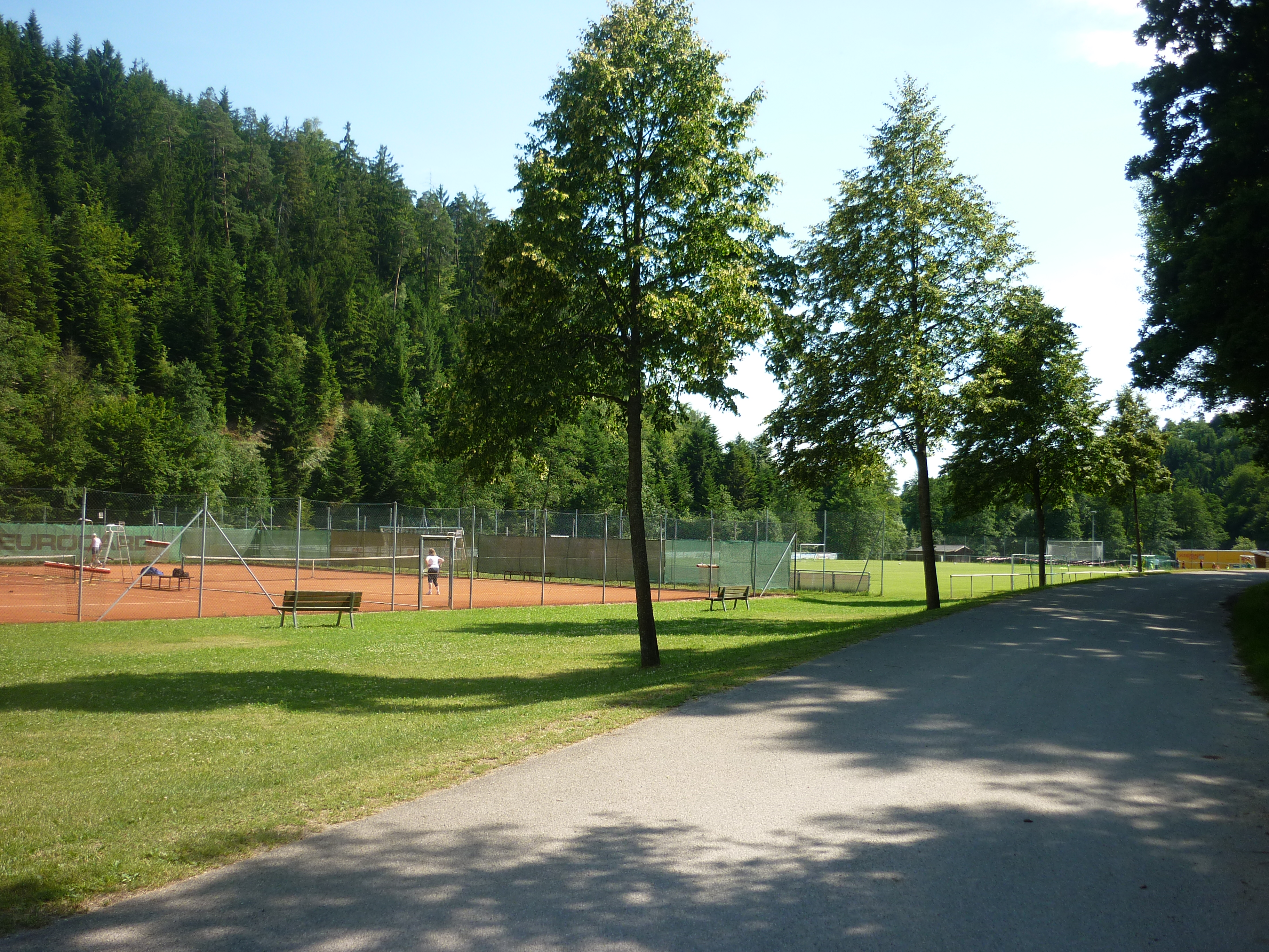 Sportanlagen der Stadt Wörth an der Donau Im Gschwelltal